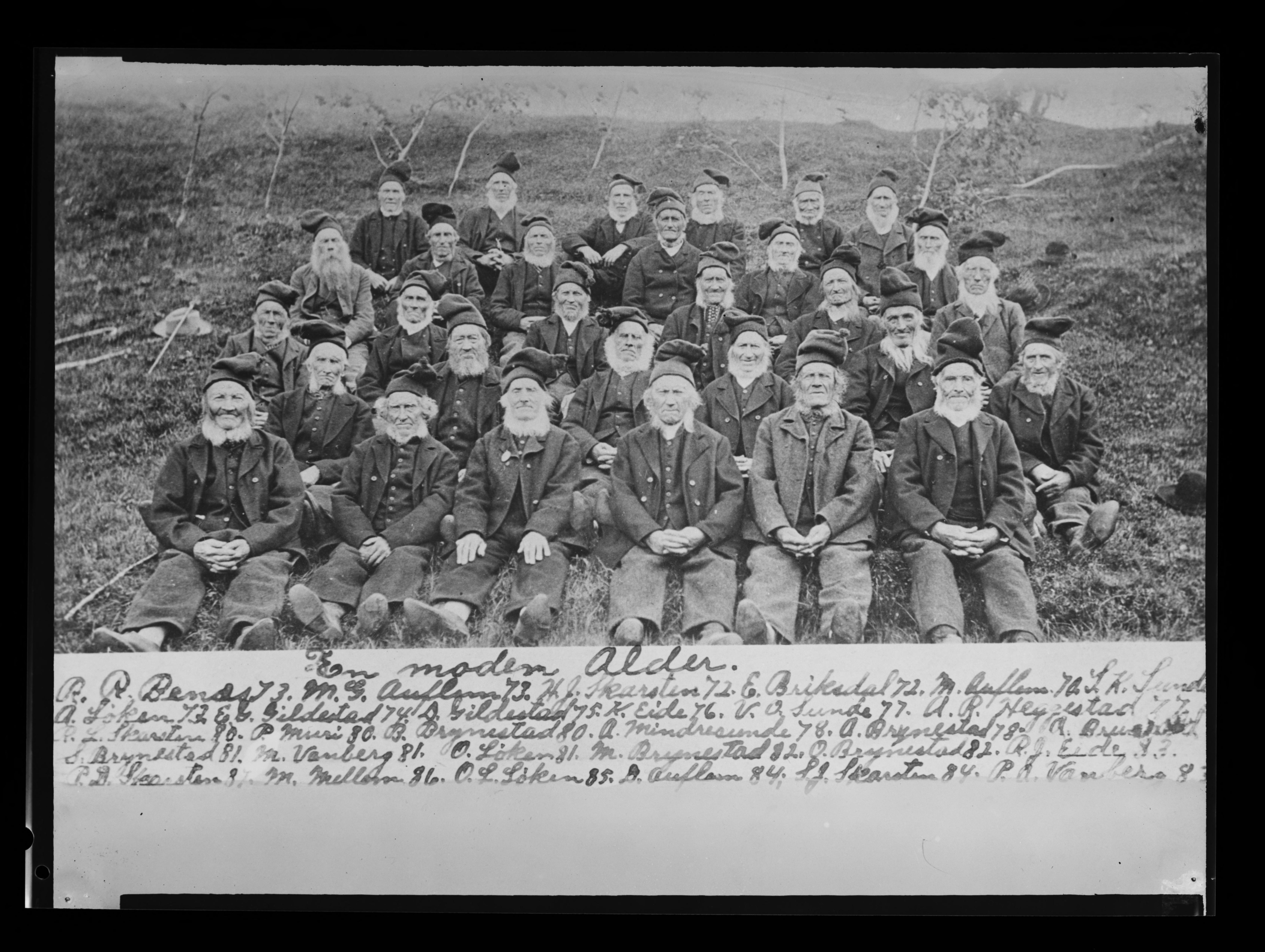 Bildet er hentet fra Nasjonalbibliotekets bildesamling. Anmerkninger til bildet var: Fotograf:Ukjent